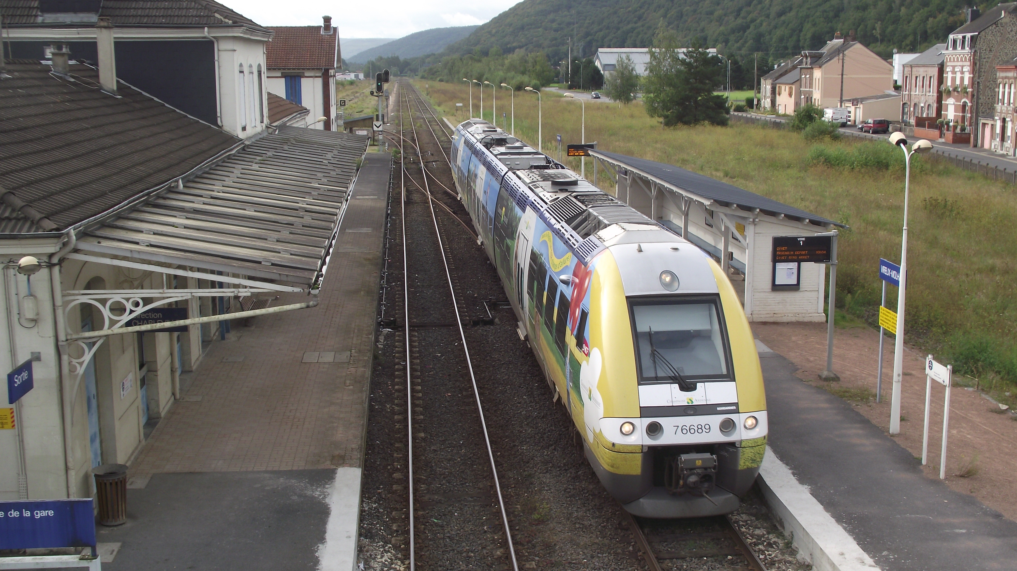 TER (FR) Transport express régional en direction de GIVET - (NL)trein in de richting van Givet.